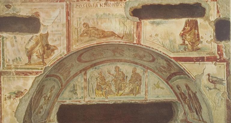 Ciriaca Katakomben: Moses, Jona, Christus mit Heiligen